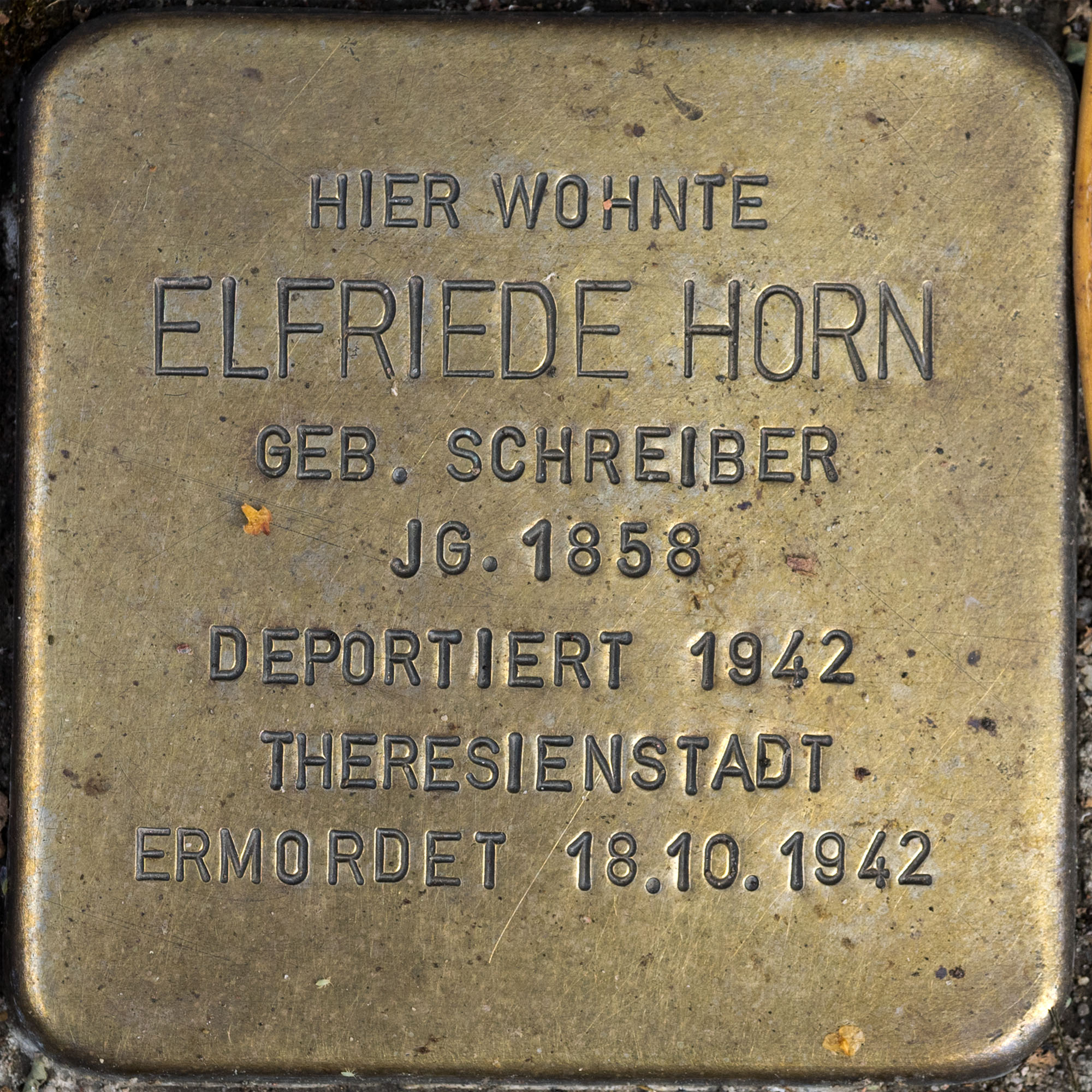 2016 Stolpersteine ToeVo Horn Elfriede